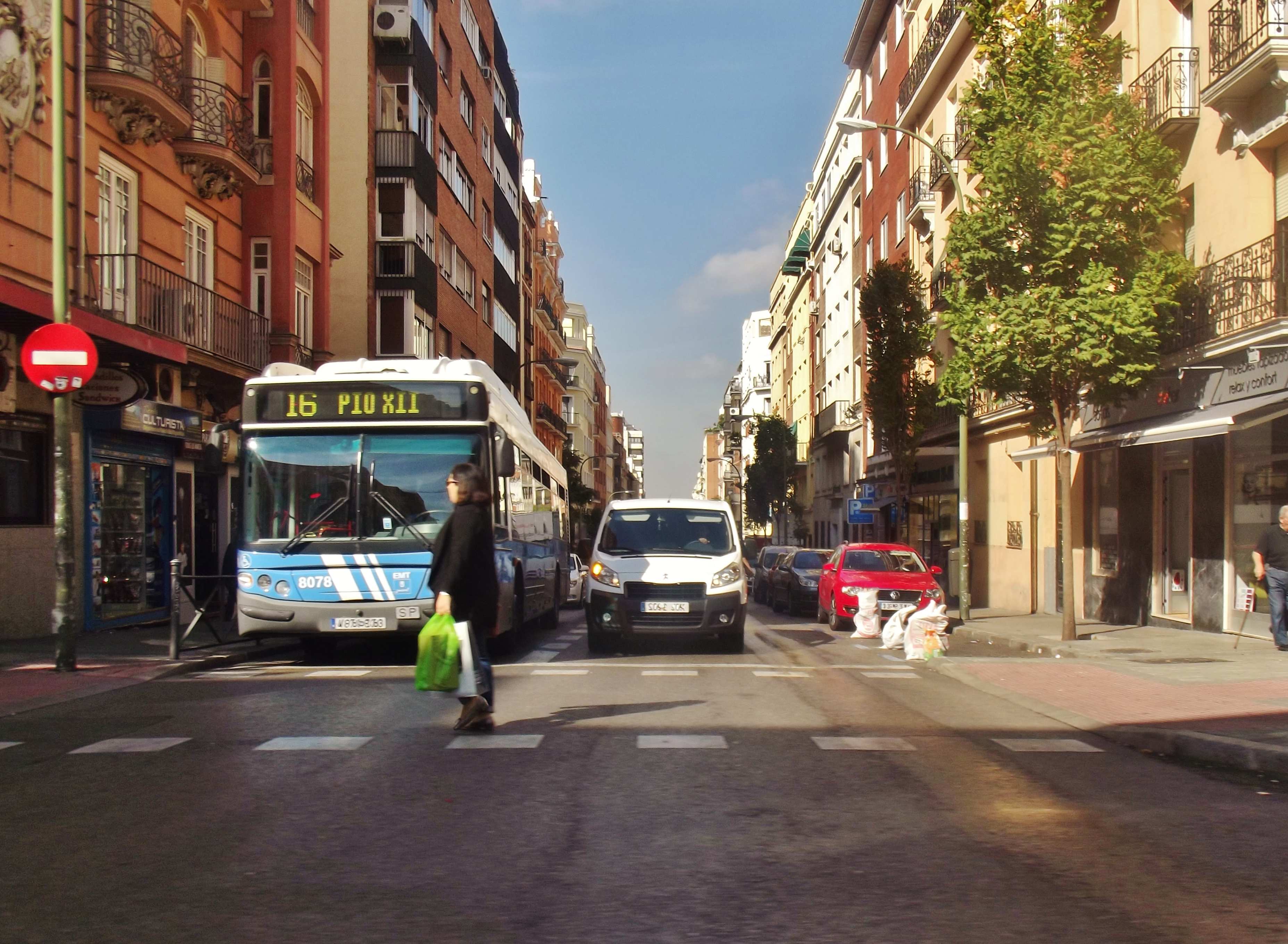 Calle de Fernández de los Ríos, Madrid. This is a retouched picture, which means that it has been digitally altered from its original version. Modifications: Hidden car plates..